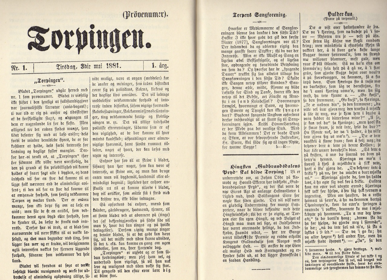 Bildet viser prøvenummeret av Torpingen